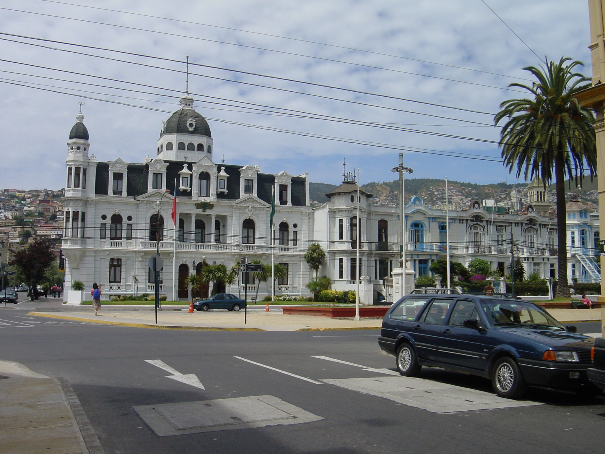 Palacio Polanco, Valparaíso.